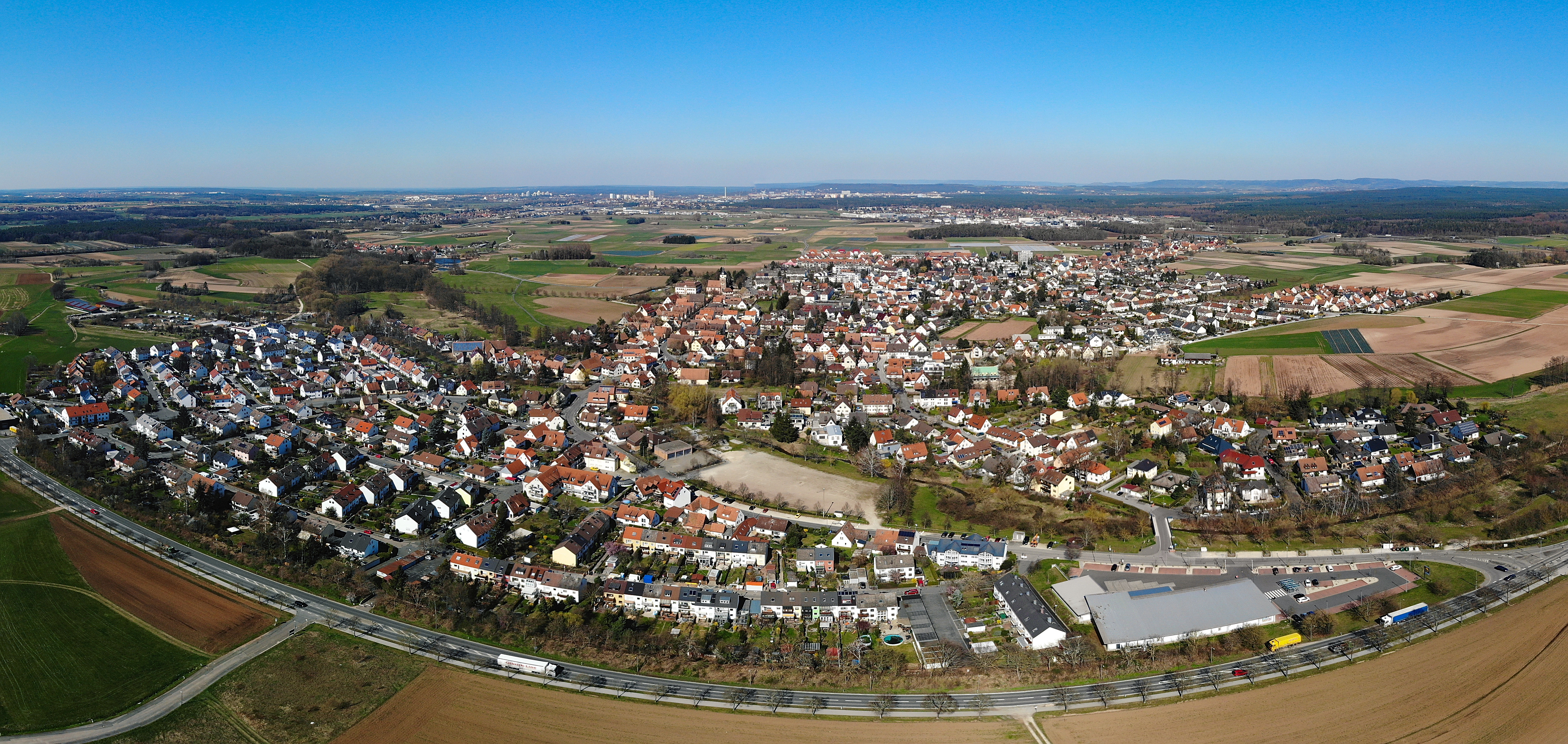 Großgründlach Panorama Luftaufnahme (2020)